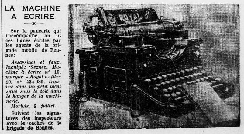 La machine à écrire, pièce à conviction dans l'affaire Seznec, photographiée lors du procès. Photographie publiée par le quotidien Ouest-Eclair le 26 août 1924